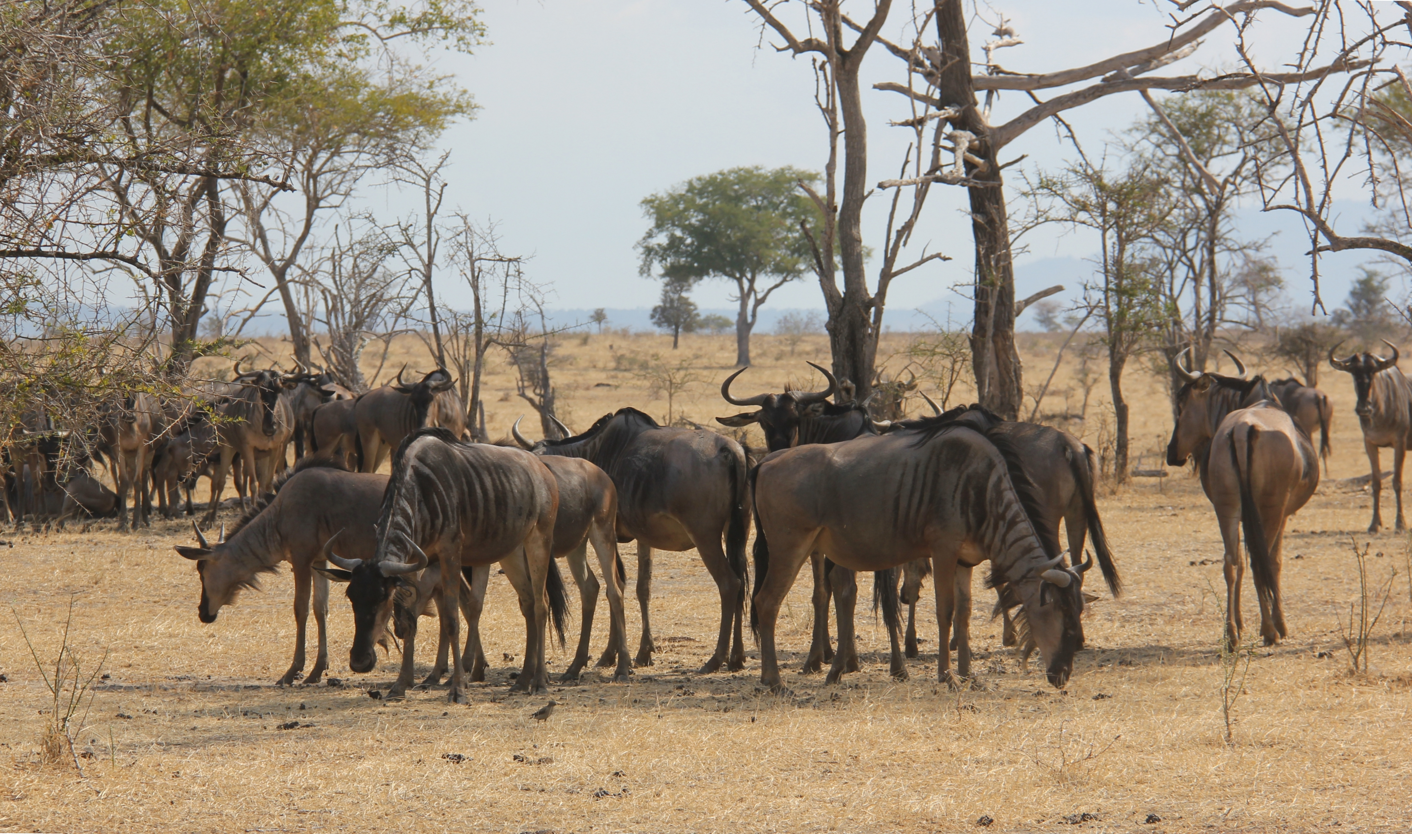 Wildebeest